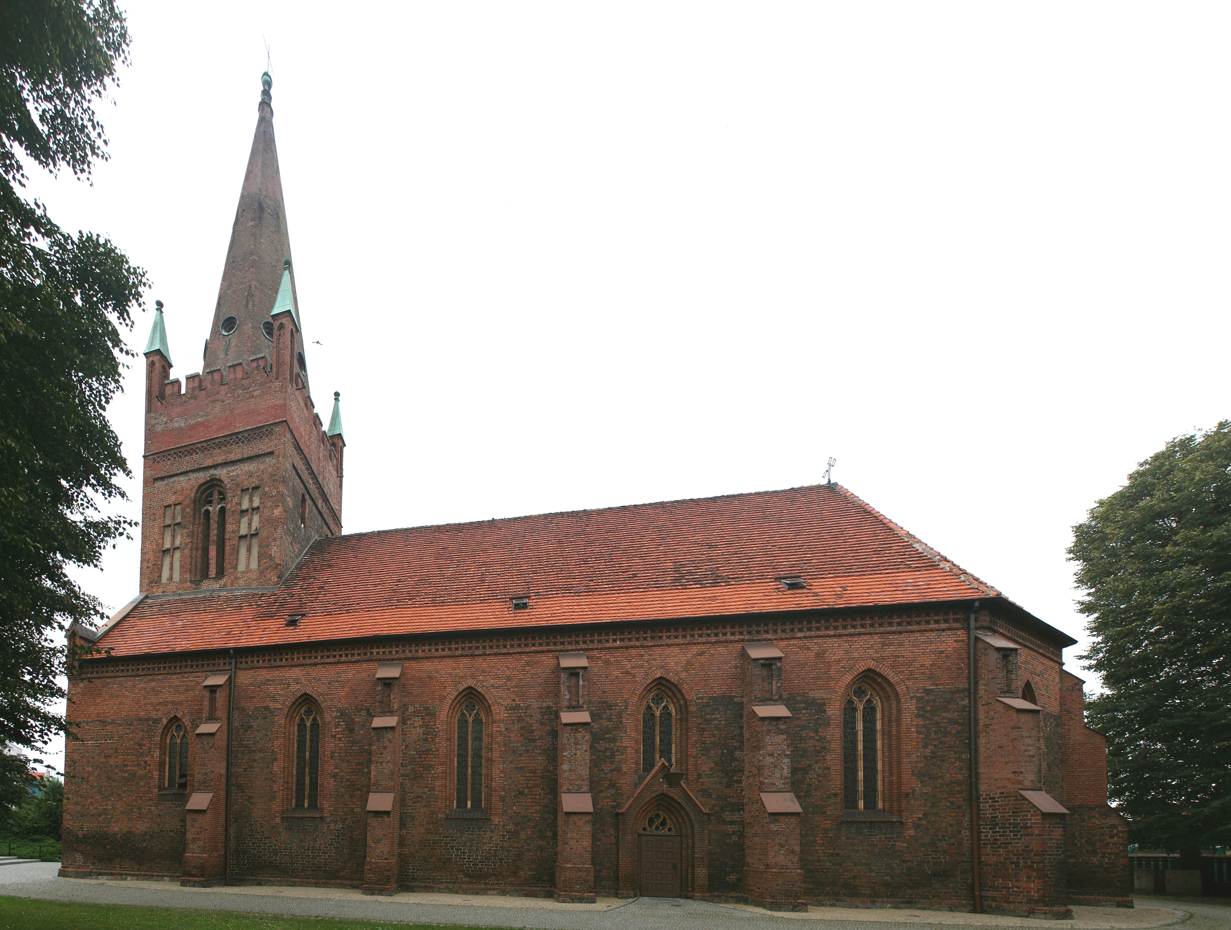 Skwierzyna. Kościół par. p.w. św. Mikołaja, XVI, XIX.